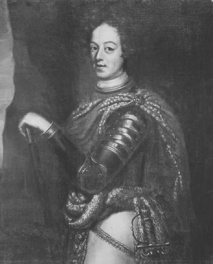 Gustav Samuel Leopold, 1670-1731, pfalzgreve av Zweibrücken, prins av Stegeborg